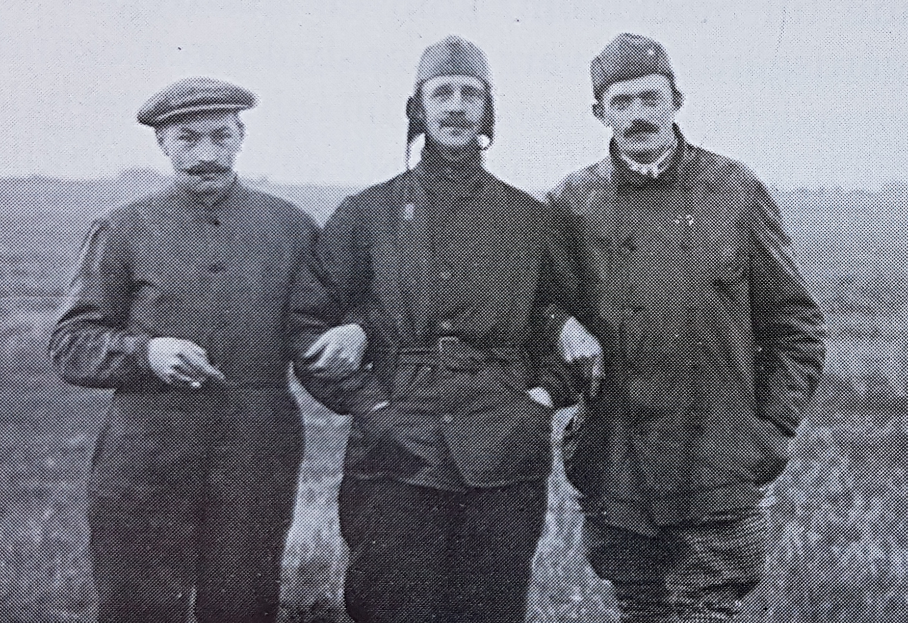 Robert Svendsen Carl Cederström Alfred Nervø inför Öresundsflygningen